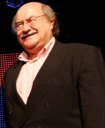 Esteban Antonio Skármeta Vranicic (* Antofagasta, Región de Antofagasta, Chile 7 de noviembre de 1940), escritor chileno.